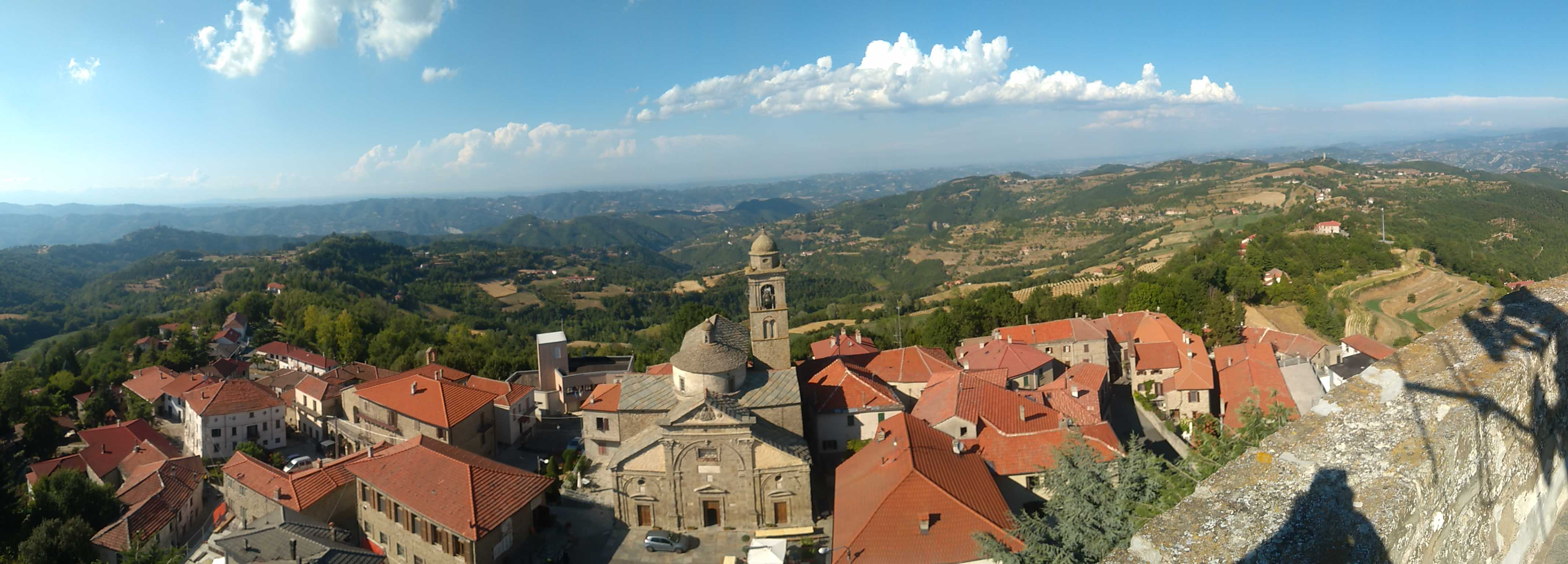 Panorama di Roccaverano dall'antica torre